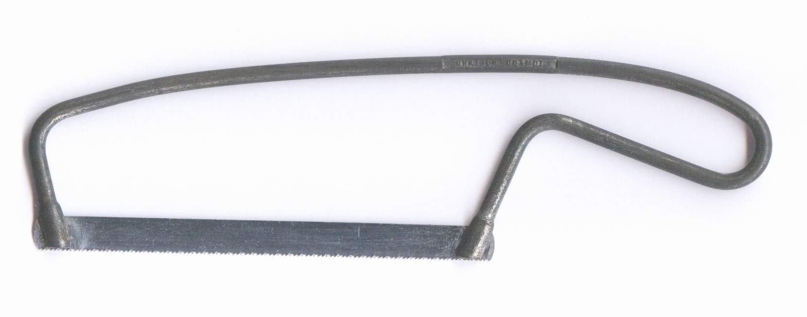 Juniorzaagje, iets groter dan standaard juniorzaagje. Zelf ingescand.